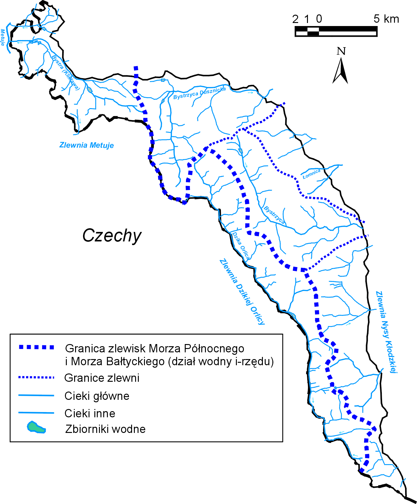 Góry Bystrzyckie, Góry Orlickie i Pogórze Orlickie - wody. Autor: M. Smoczyk, 2006.